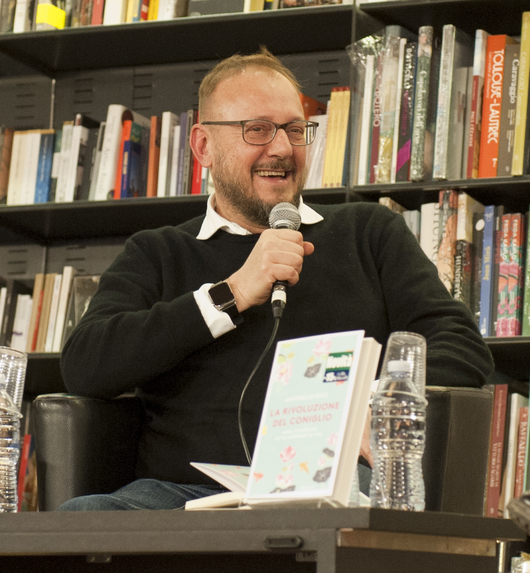 Antonello Dose